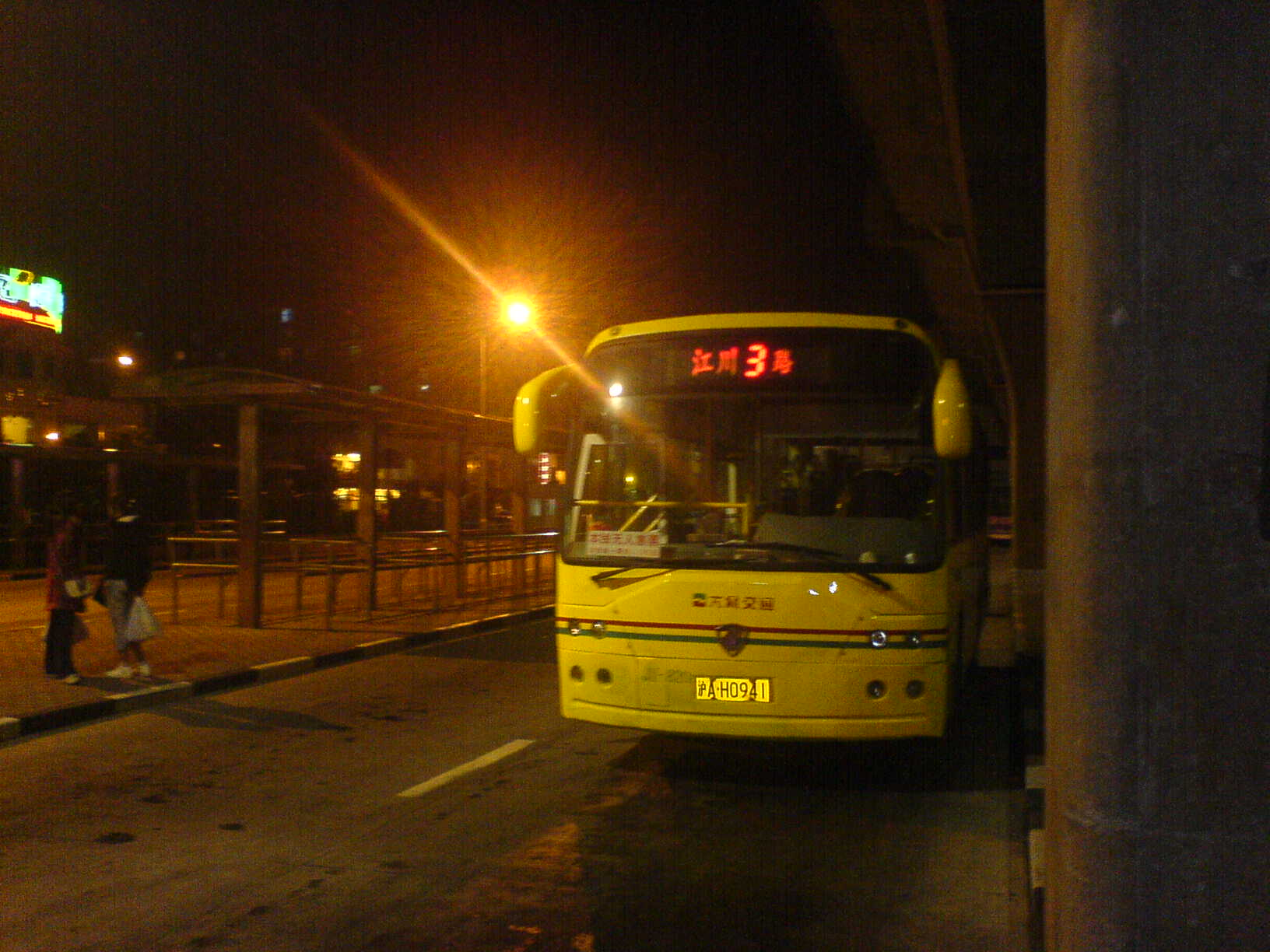 Dazhongjituanjc3lu